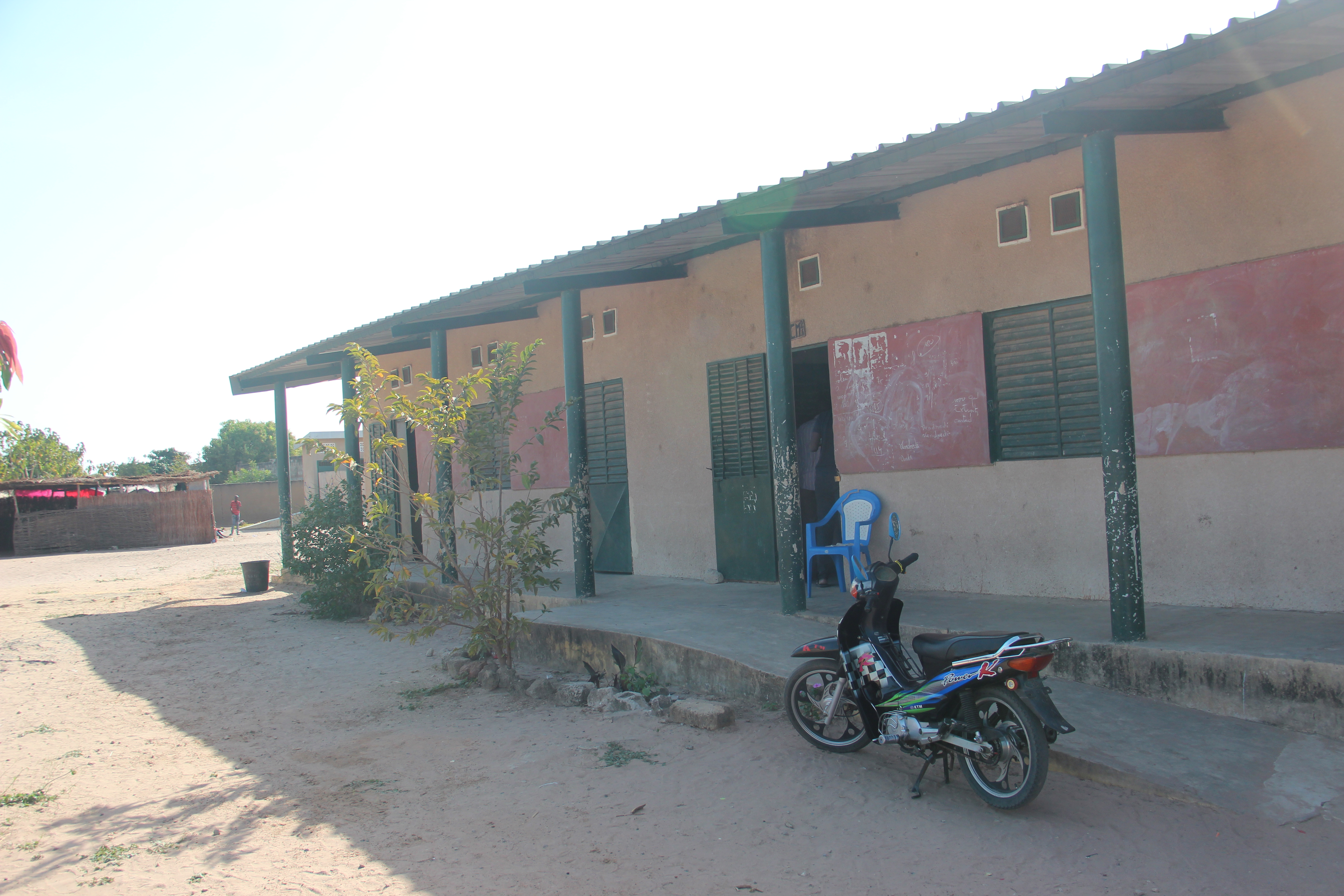 Moto dans une école de Karang Poste (Sénégal). This is an image with the theme "Africa on the Move or Transport" from: Senegal